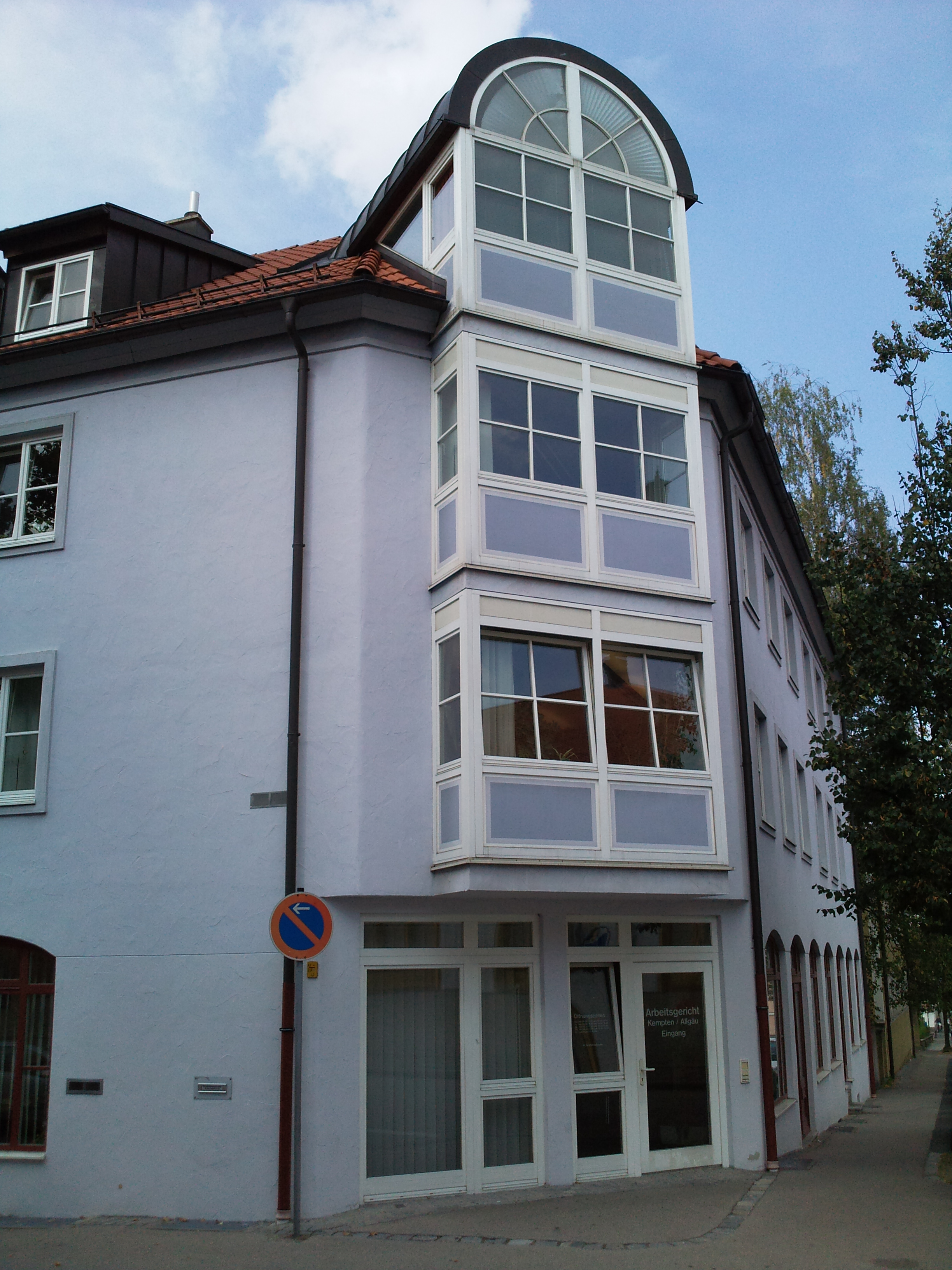 Gebäude des Arbeitsgerichts Kempten.